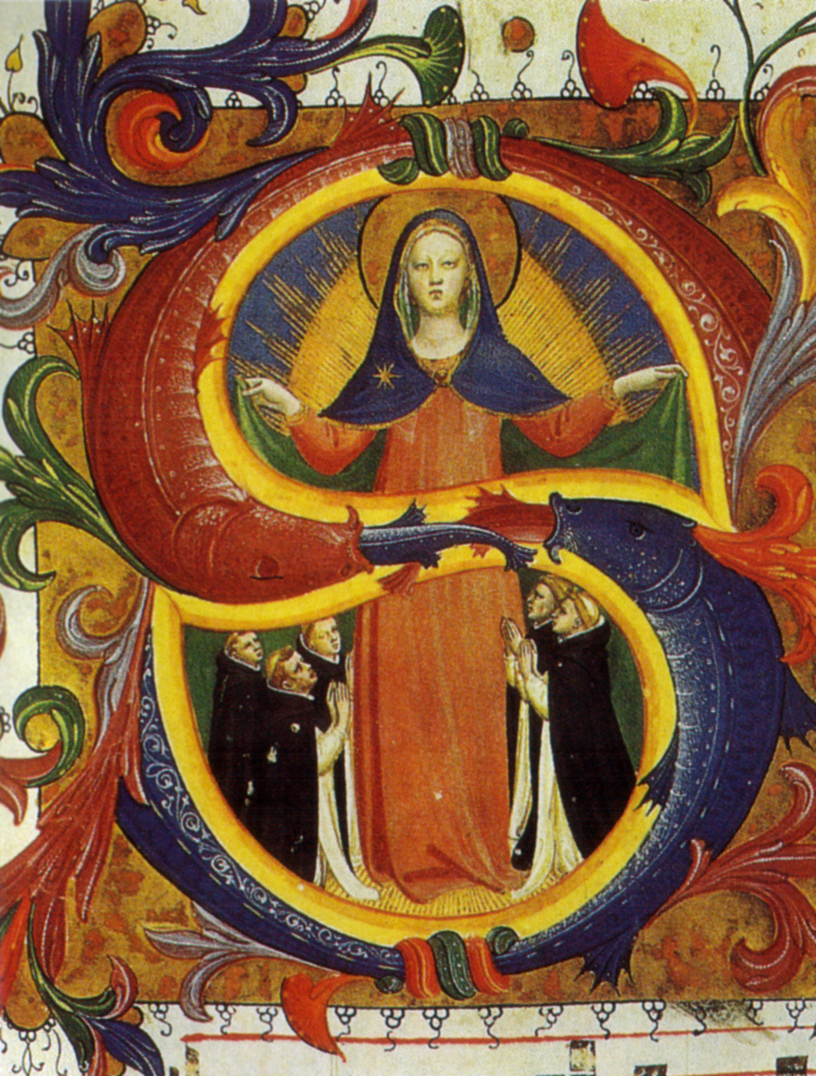 Messale 558, vergine protettrice dei domenicani